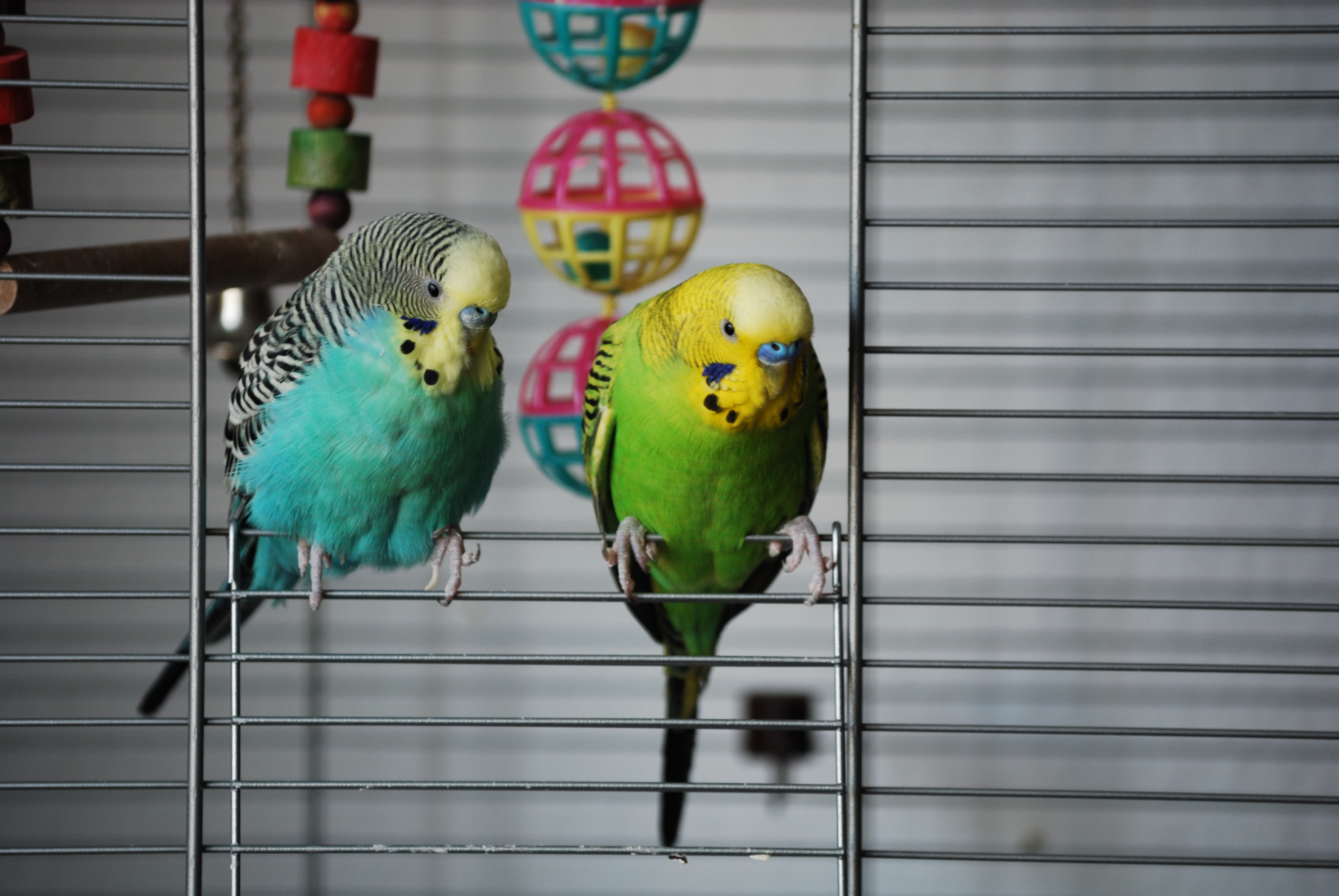 Pet Budgerigars, Melopsittacus undulatus.